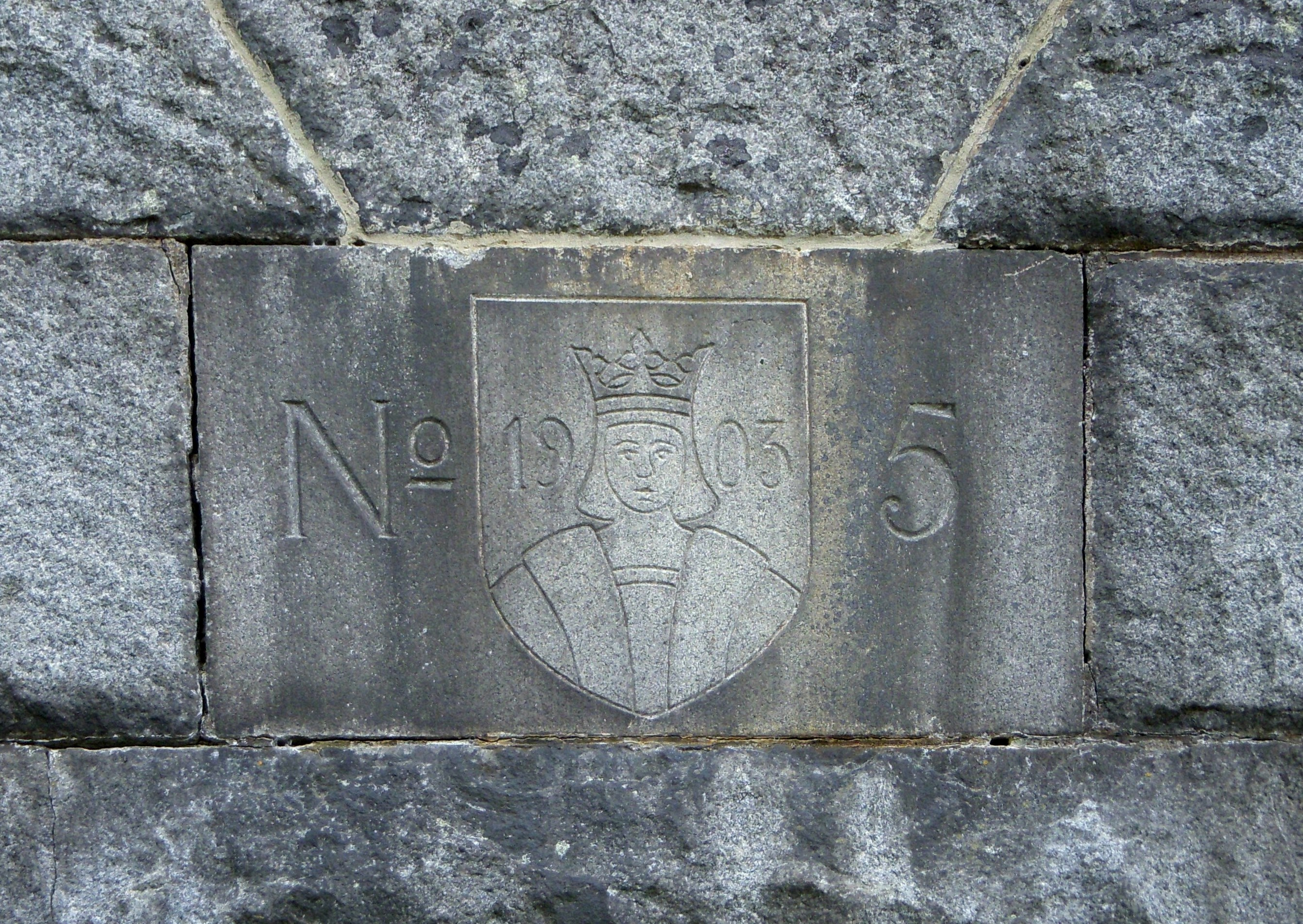 Vattenvaktarstugan, Fittja, årtal på kontrollbyggnaden